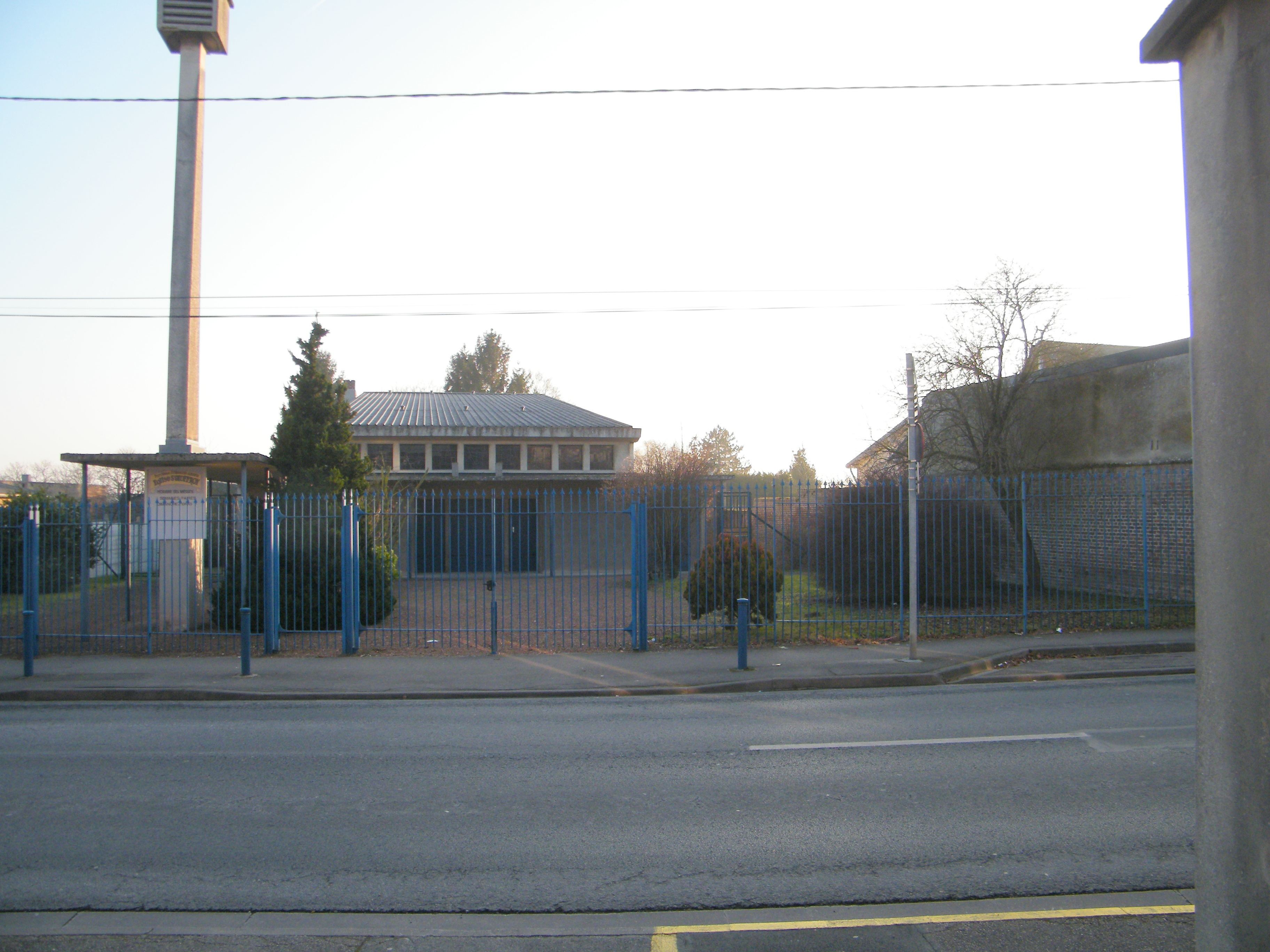 Rivery, Somme, fr, église Saint-Geoffroy de 1960.